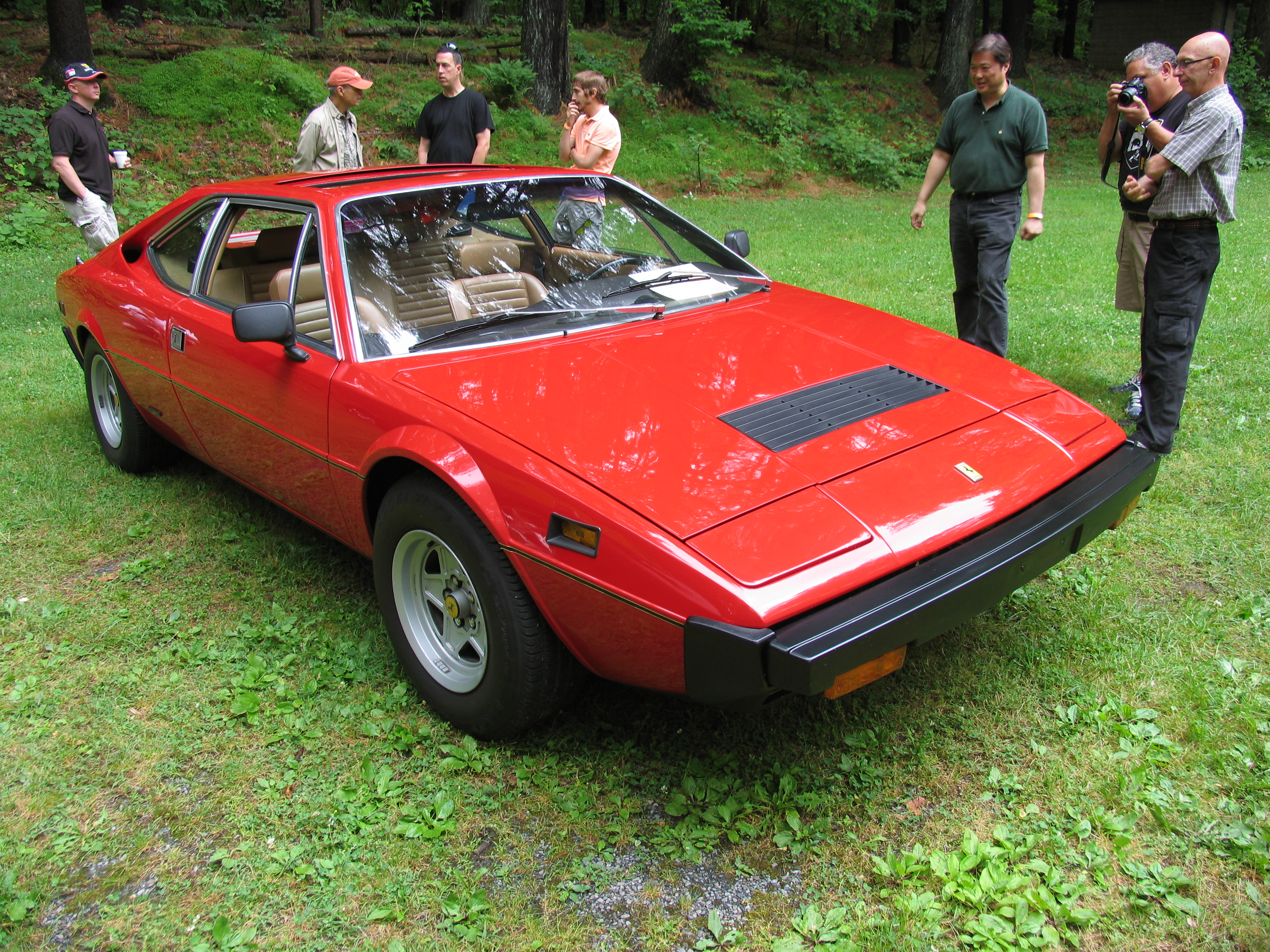 Ferrari 308GT4 Dino